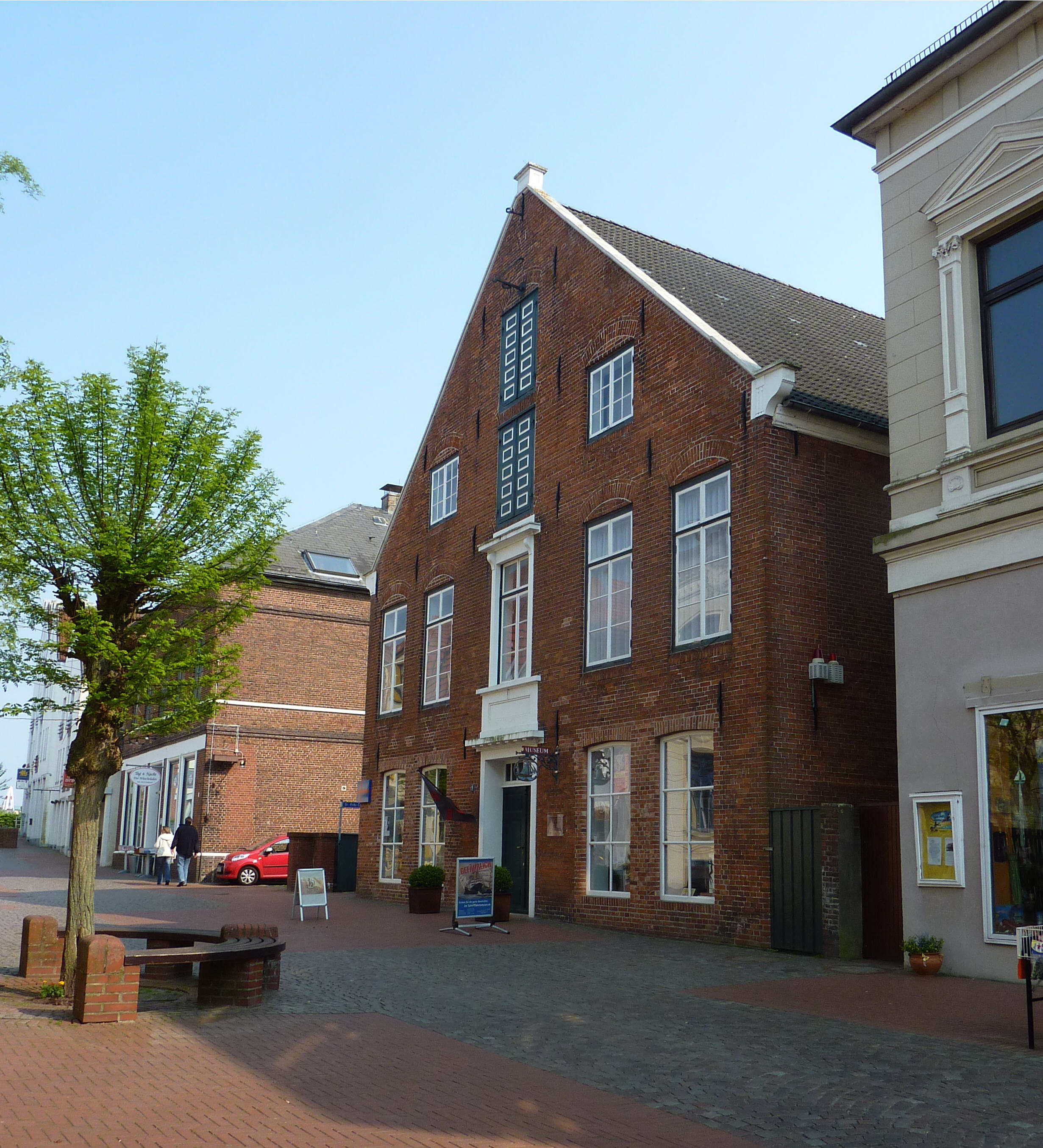 Schifffahrtsmuseum in Brake